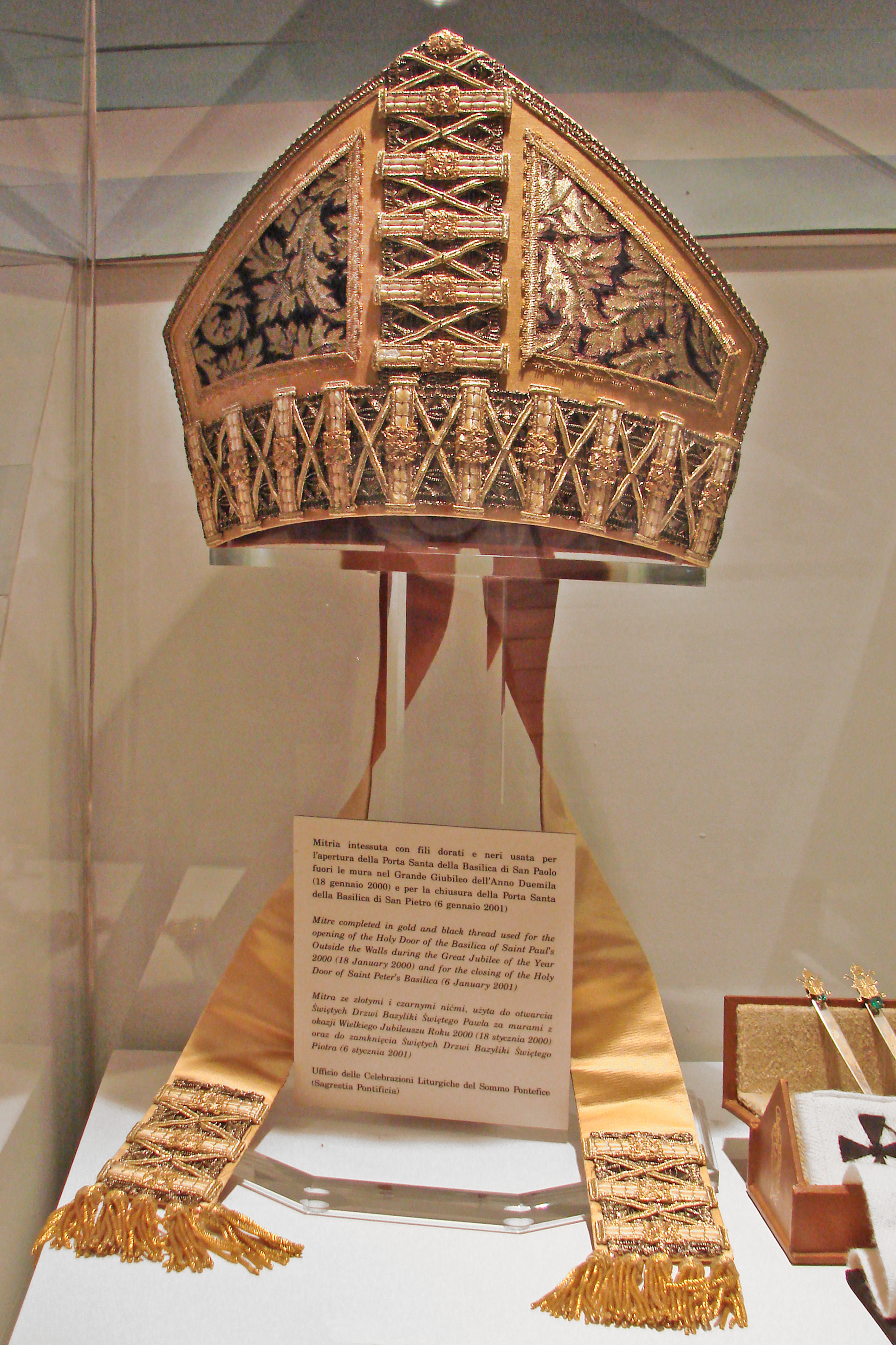 Exposition en hommage à Jean-Paul II au Vatican Mitre utilisée par Jean-Paul II lors de la fermeture de la Porte sainte de la basilique Saint-Pierre le 6 janvier 2001 à l'occasion du grand Jubilé de l'an 2000. Site de la fondation Jean-Paul II (1920 - 2005) Site sur la Béatification de Jean-Paul II